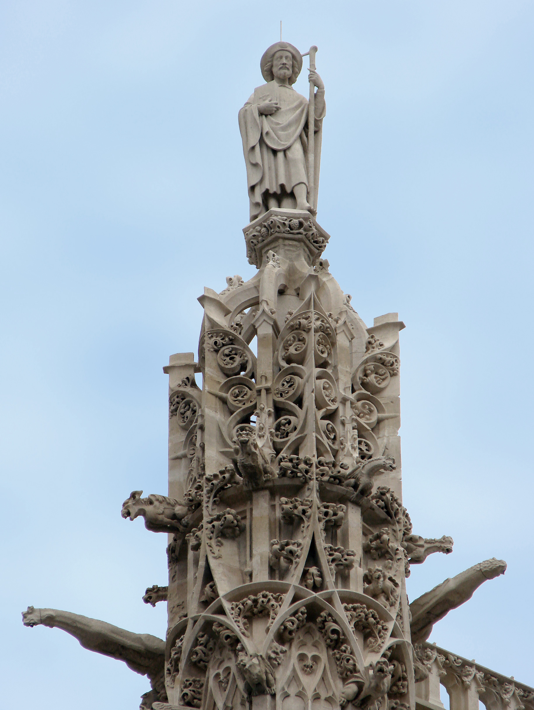 La Tour Saint-Jacques à Paris après restauration: la statue de Saint Jacques.